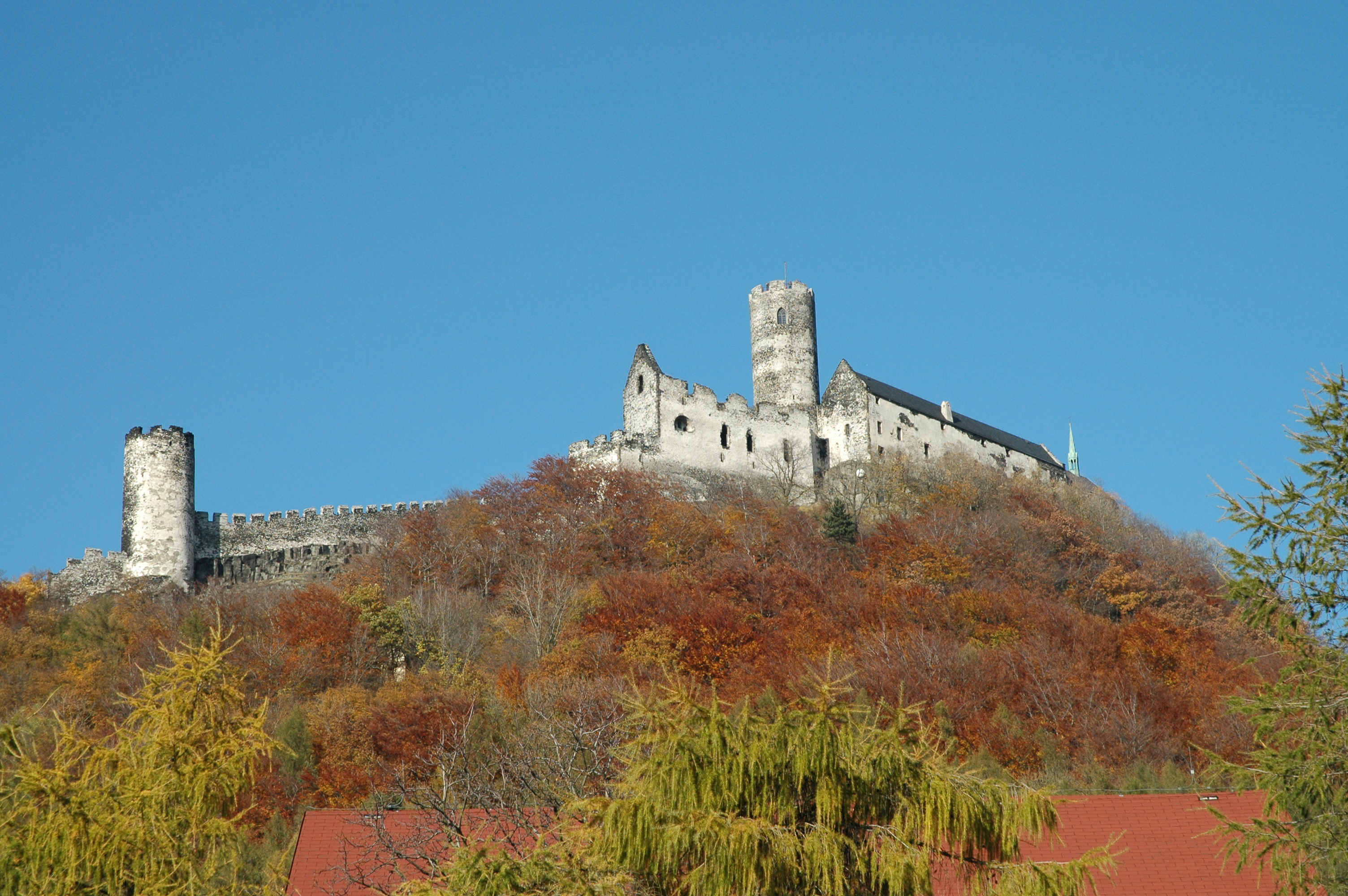 Bezděz Castle